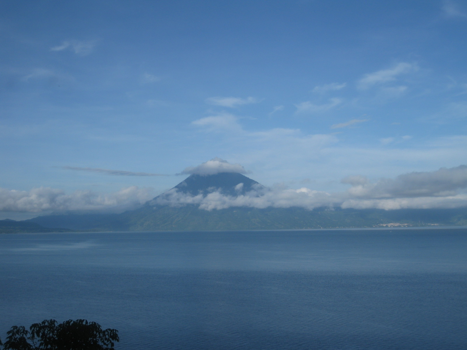 Imatge del Llac d'Atitlán (Guatemala)